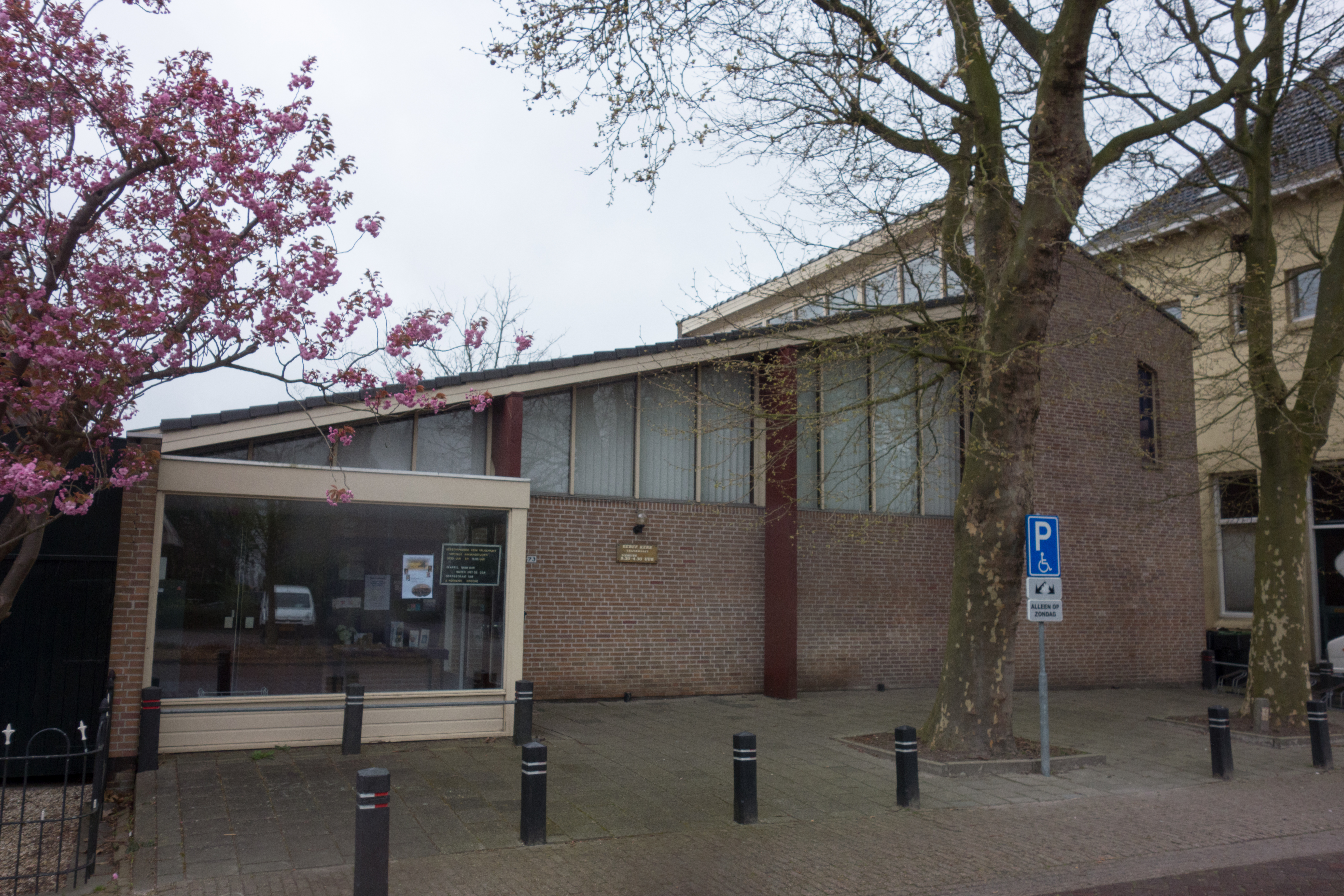 Onopvallend kerkgebouw aan de Dorpsstraat 73 in Broek op Langedijk.